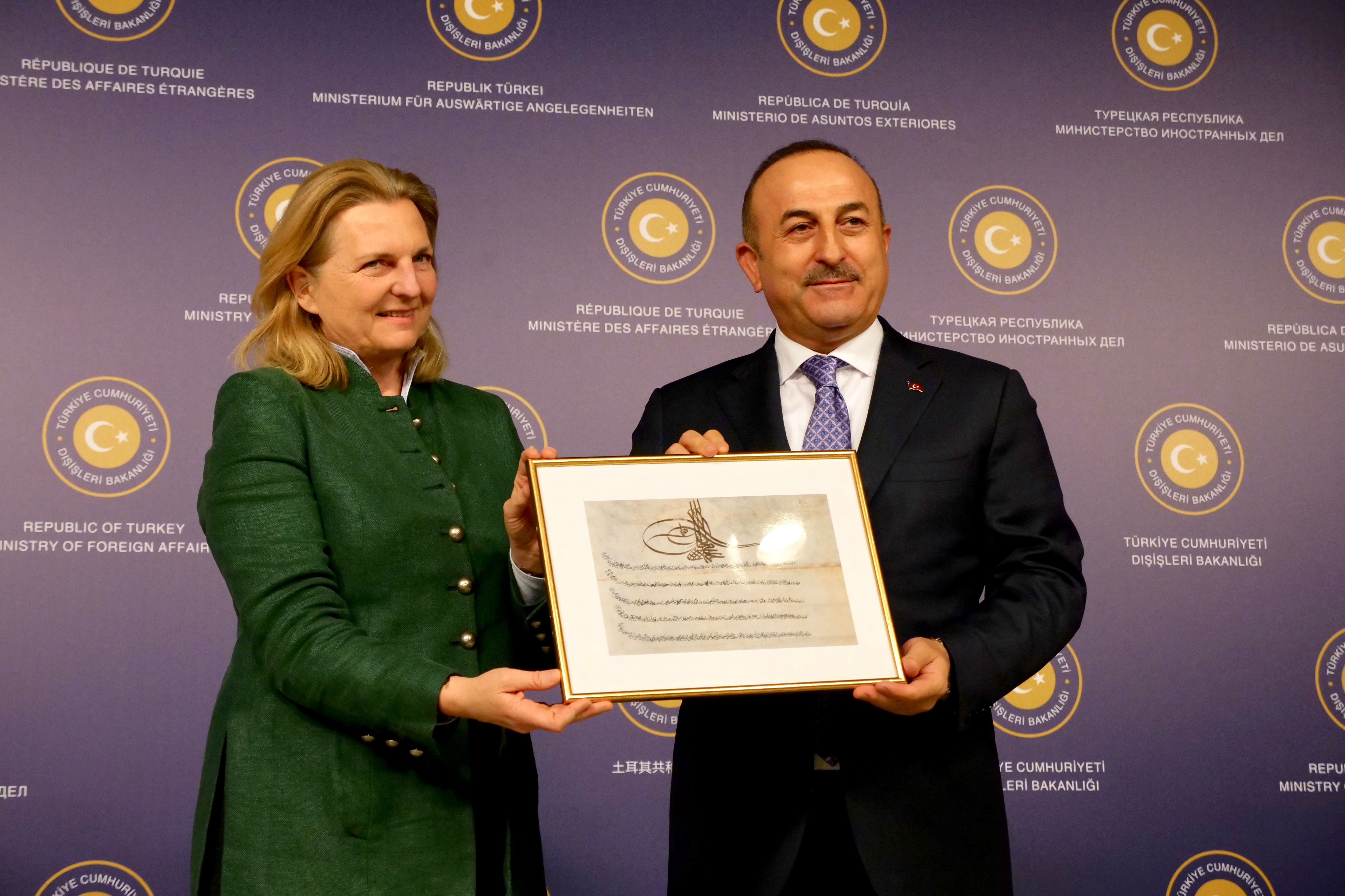 Außenministerin Karin Kneissl trifft bei ihrem Besuch in der Türkei den türkischen Außenminister Mevlüt Çavuşoğlu. Foto: Angelika Lauber